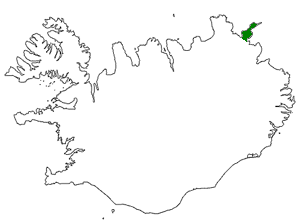 is:Langanes, kort búið til af Bjarki Sigursveinsson.